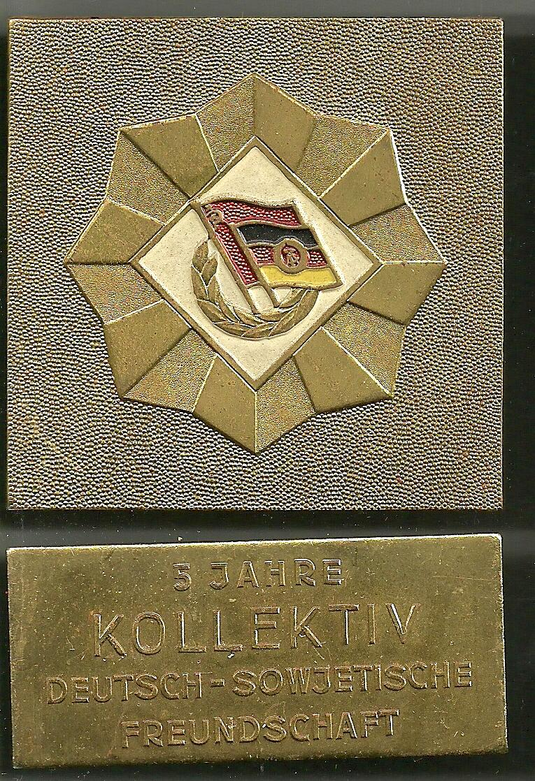 Ehrenplakette Kollektiv der DSF - mit 5 facher Verteidigung